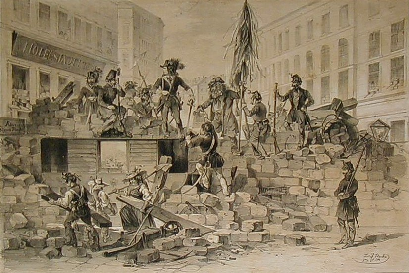 Barrikade am 26. und 27 Mai. 1848 Wien